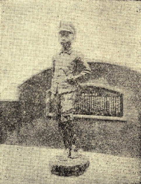 君が代少年（詹德坤）の銅像